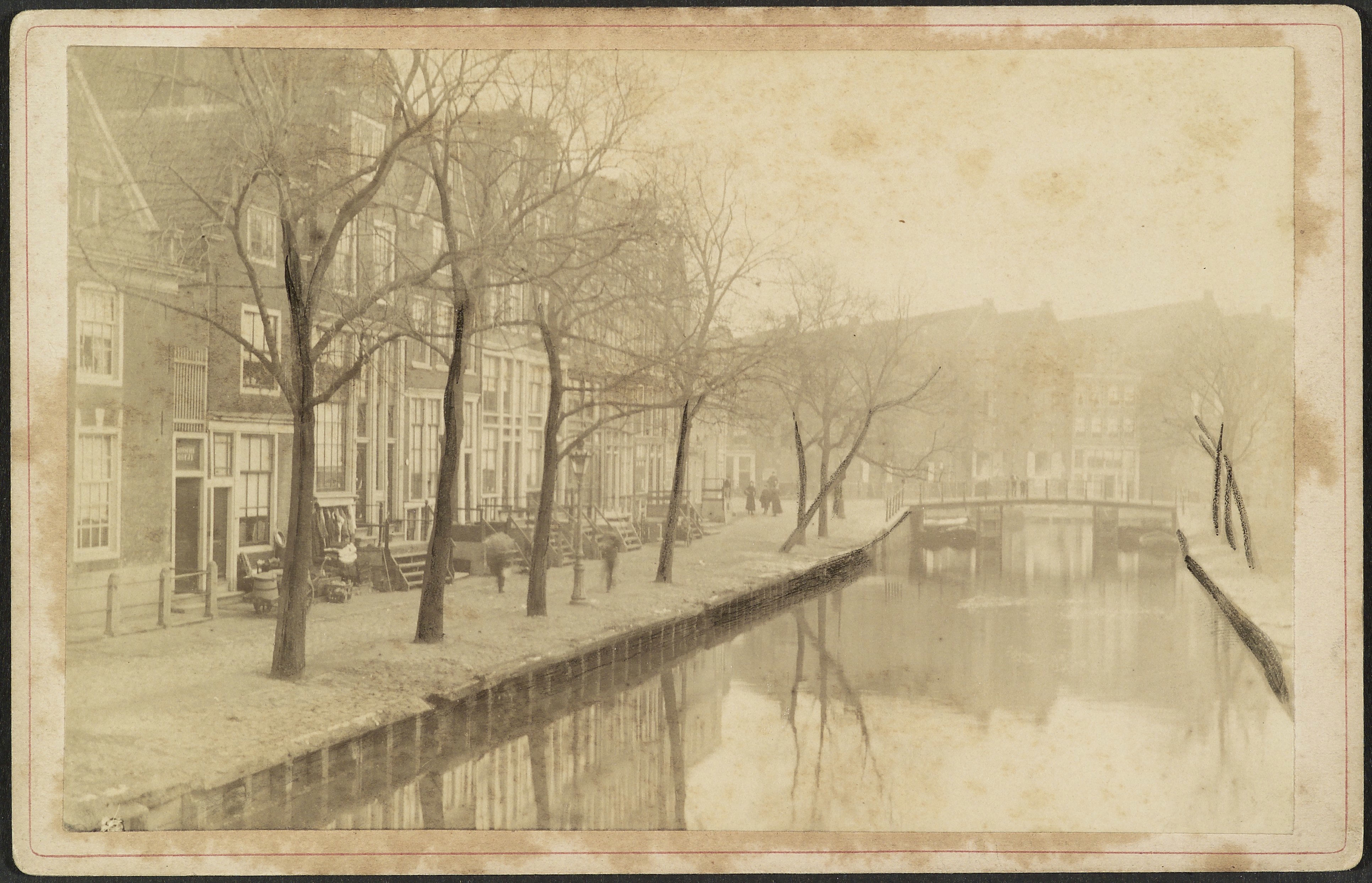 Gracht: Palmgracht met brug en gevelwand (opmerking: Kabinetfoto); Noordelijke gevelwand richting Brouwersgracht (tevens herkenningspunt). Palmgracht inmiddels gedempt, de brug afgebroken, veel gebouwen gesloopt, lijkt ter hoogte van nummer 18